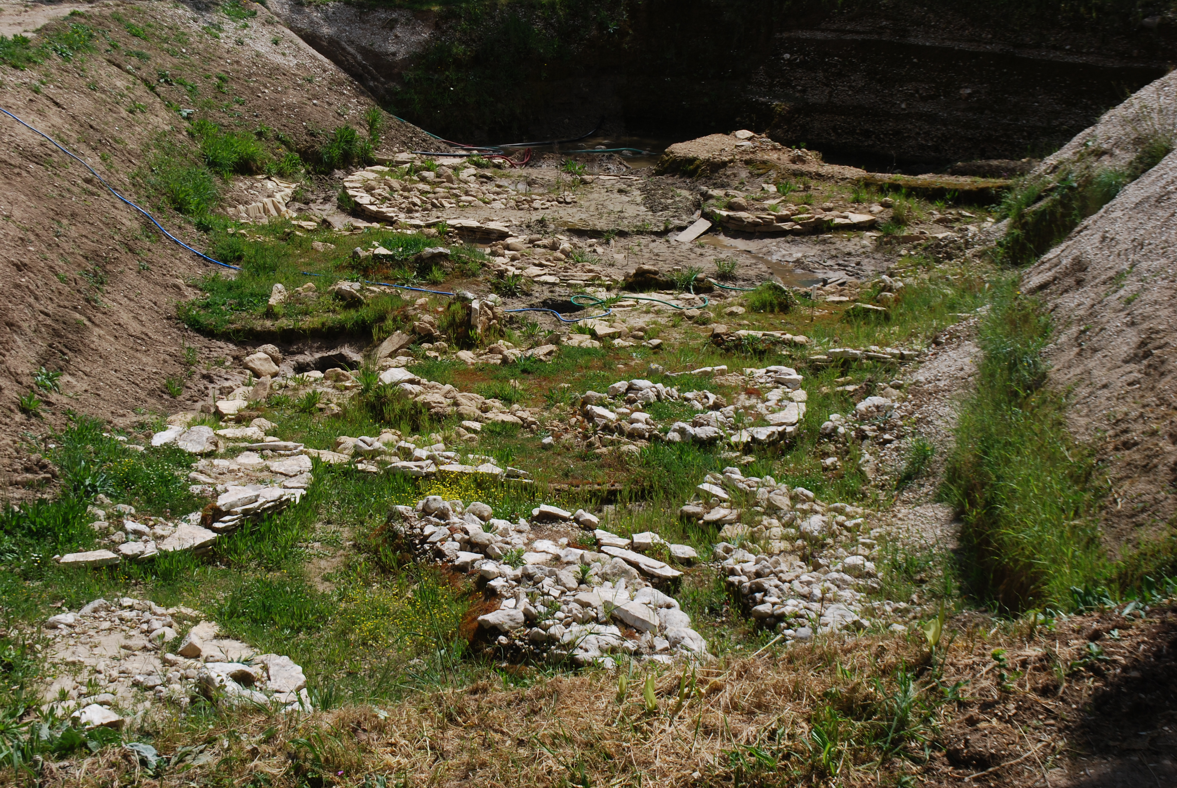 Vue de Nydri.